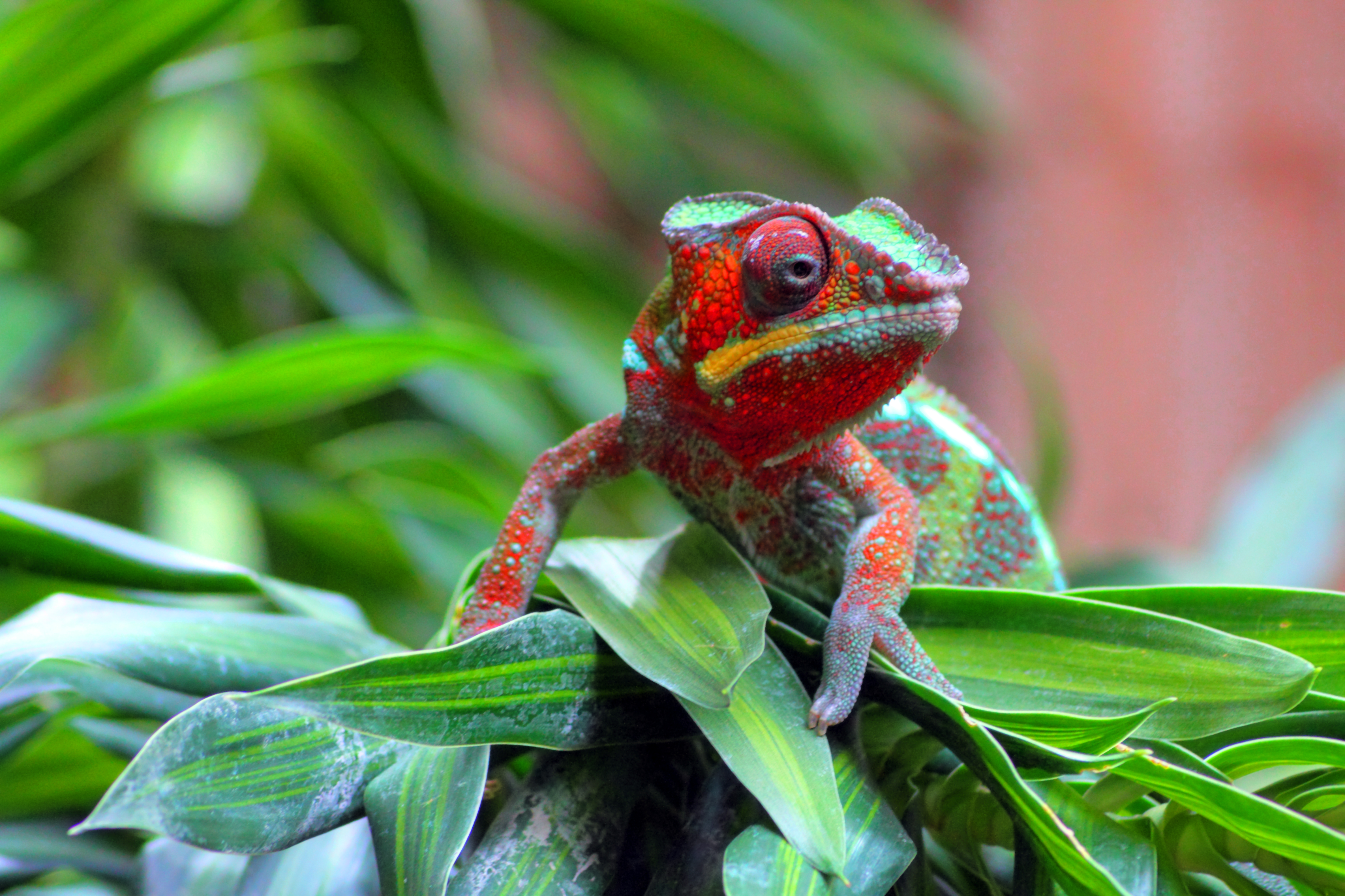 Canon EOS 500D Objektiv: Tamron AF 70-300mm 4-5,6 Di LD Macro 1:2 aus der Hand Bearbeitung: HDR (3 Bilder aus RAW) + Photomatix Kritik und Lob sind immer willkommen!